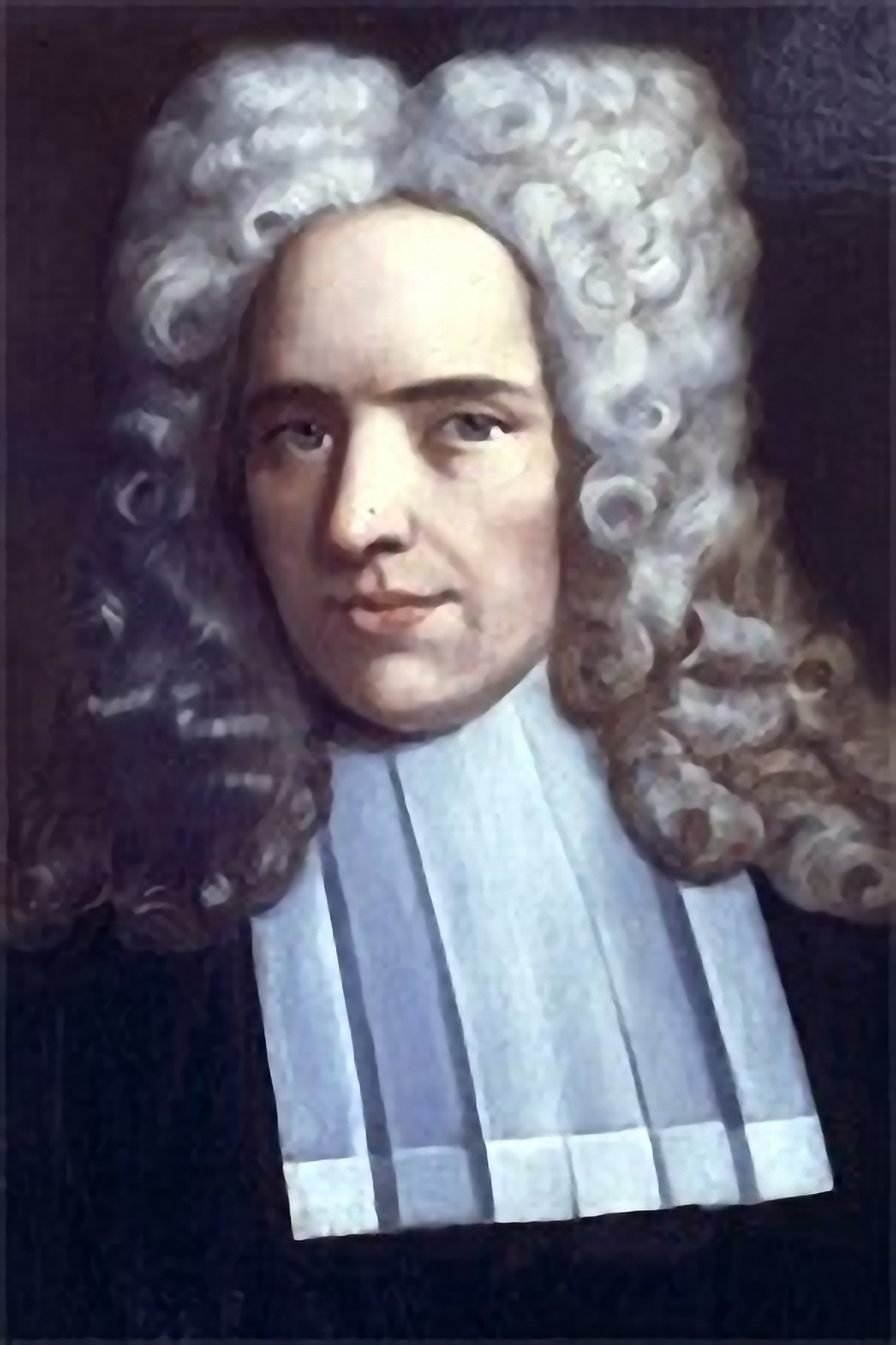 Jacobus Voorda, niederländischer Jurist